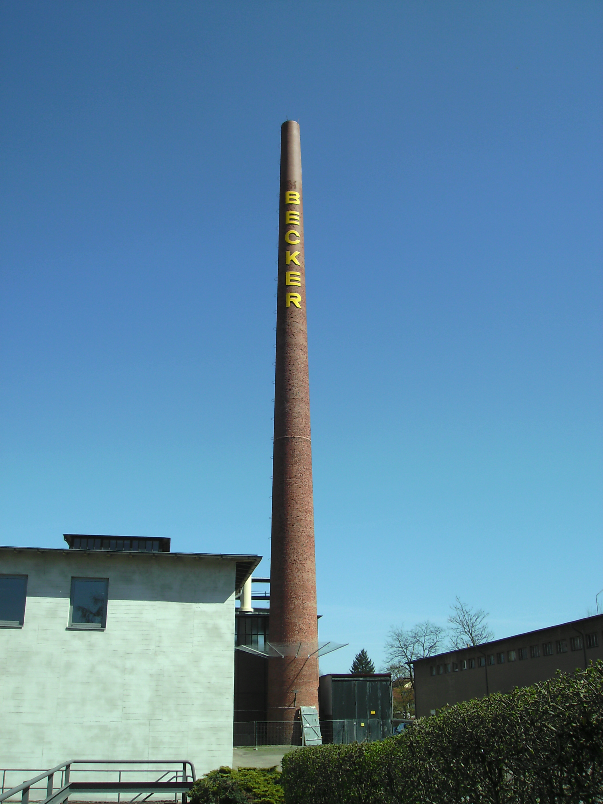 Schornstein der Brauerei Becker (mit Beckerturm Wahrzeichen St. Ingberts)